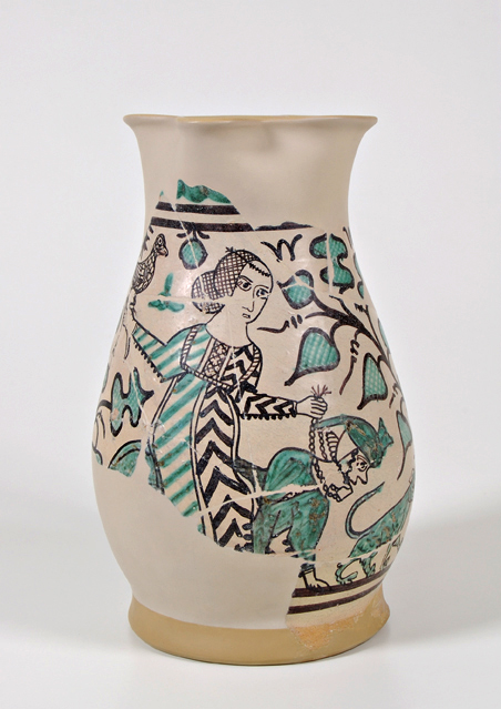 Boccale medioevale di Faenza con la rappresentazione di Fillide e Aristotele